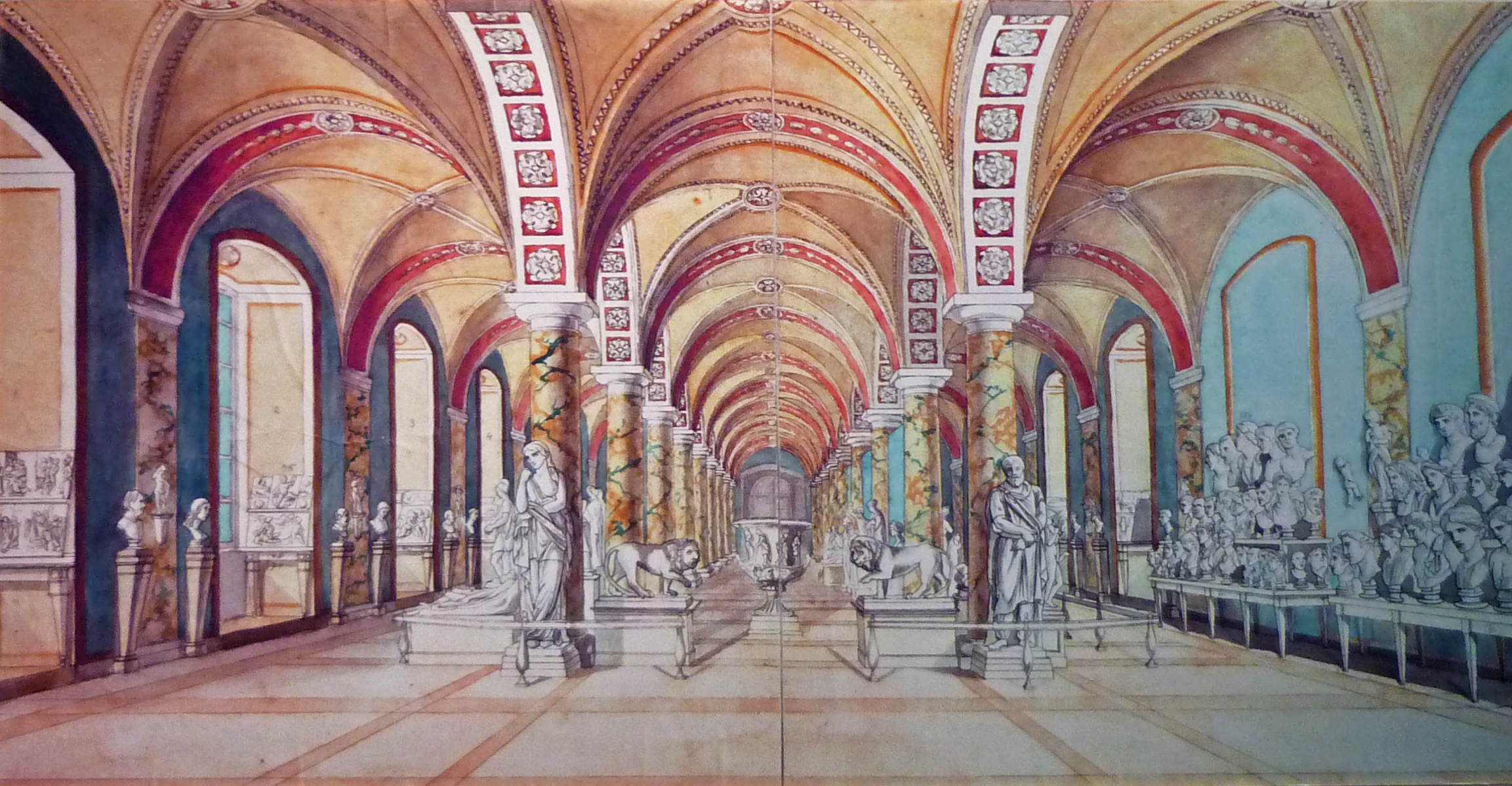 Verkehrsmuseum Dresden: Aquarell von Johann Gottlob Matthäi (1753–1832) zur ehem. Mengs´schen Abguss-Sammung in der Osthalle des Johanneums, jetzt Schienenfahrzeug-Halle; nach: Kolorierte Federzeichnung aus dem "Catalogue des jets de stuc des plus excellentes Antiques en Figures, Bas-reliefs, tetes, mains, pies etc. que Son Altesse-Serenissime Electorale de Saxe, Frederic Auguste a achete de Roma, par Jean Gottlob Matthaei", Falttafel, unpubliziert. 1794.